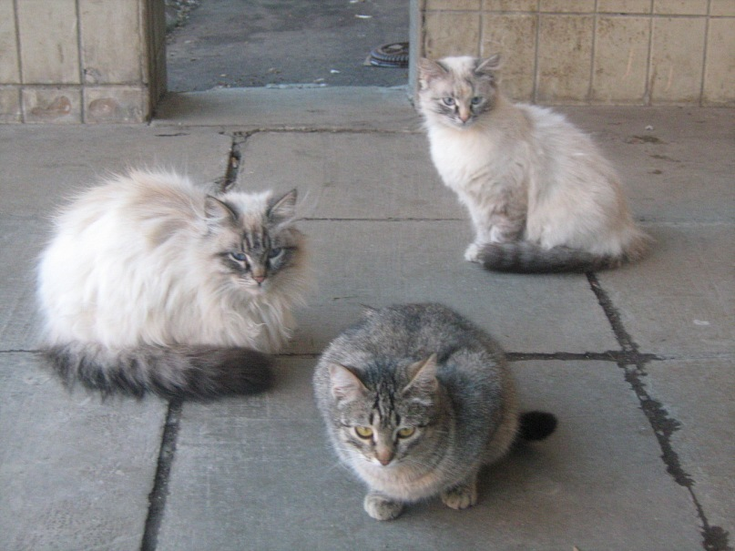 Бездомные кошки, Химки